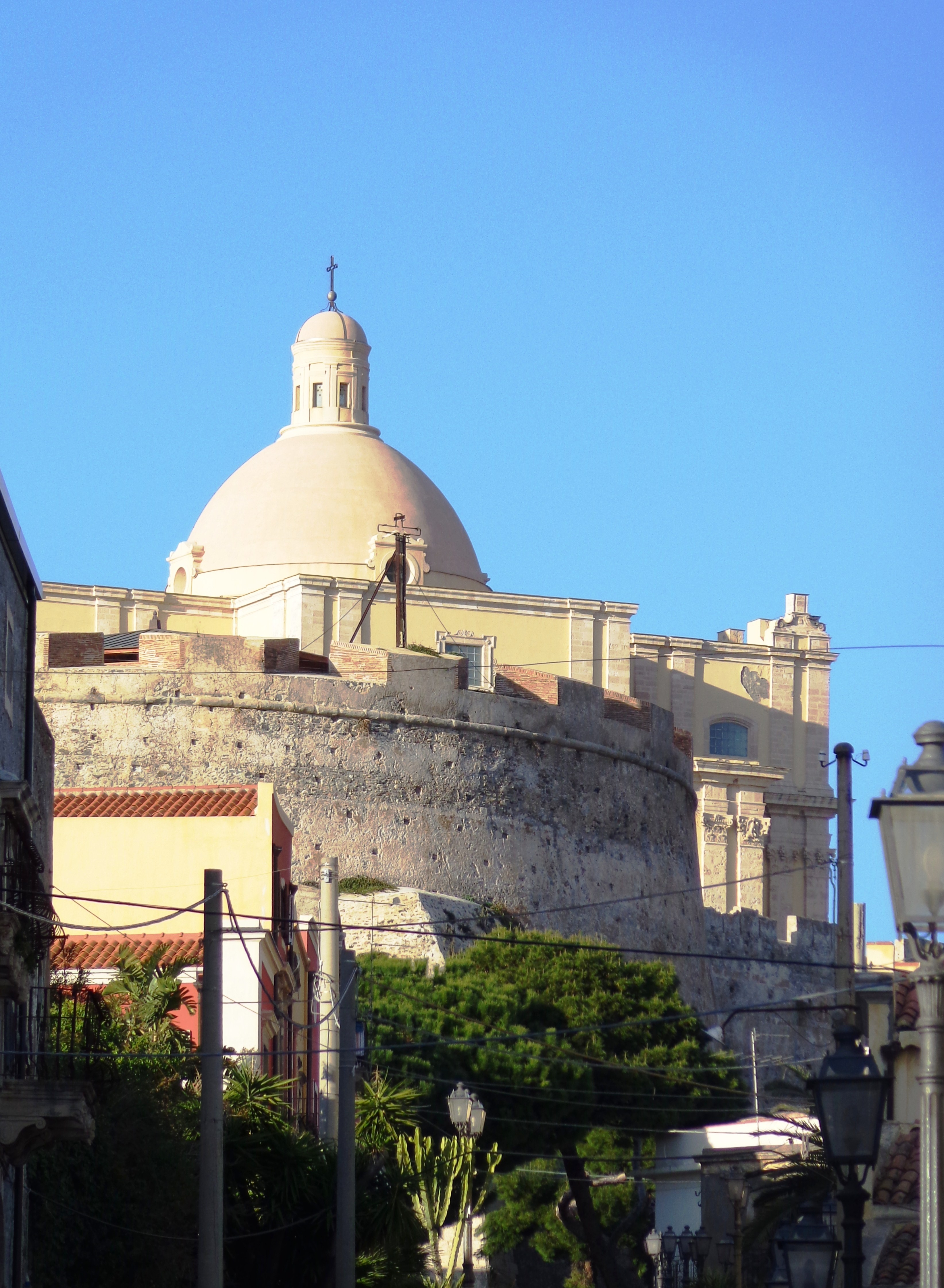 Duomo antico inquadrato dal Palazzo dei Viceré e bastione di Santa Maria.